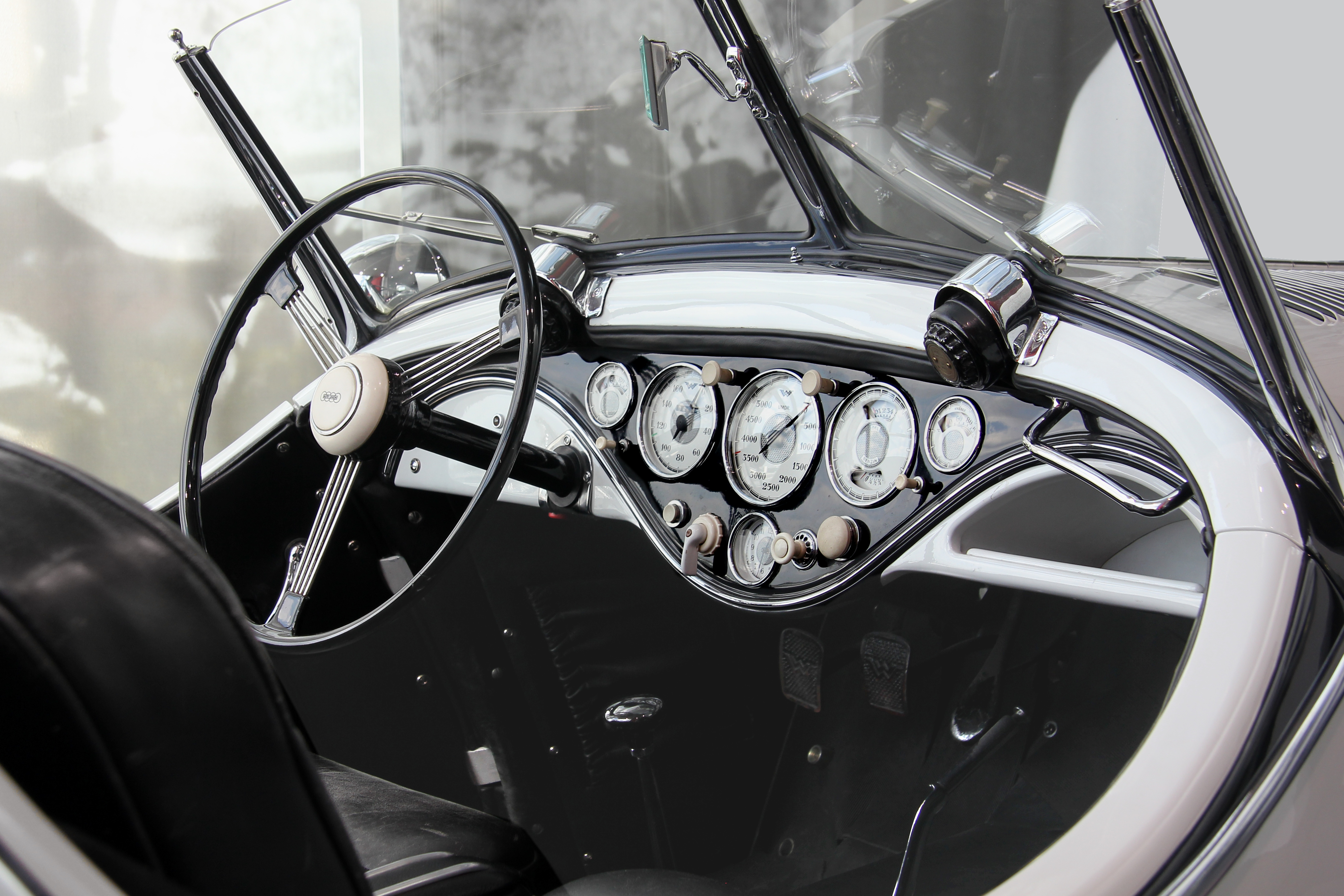 Cockpit des Wanderer W 25 K, Baurjahr 1938, im museum mobile: 6-Zylinder-Viertakt-Reihenmotor mit Kompressor, 1963 cm³ (Bohrung 70 mm, Hub 85 mm), 85 PS bei 4000/min (lt. Infotafel im museum mobile), Höchstgeschwindigkeit 145 km/h, Verbrauch 20 l/100 km, Preis 7.950 RM, 259 Stück gebaut, Bauzeit 1936 bis 1938